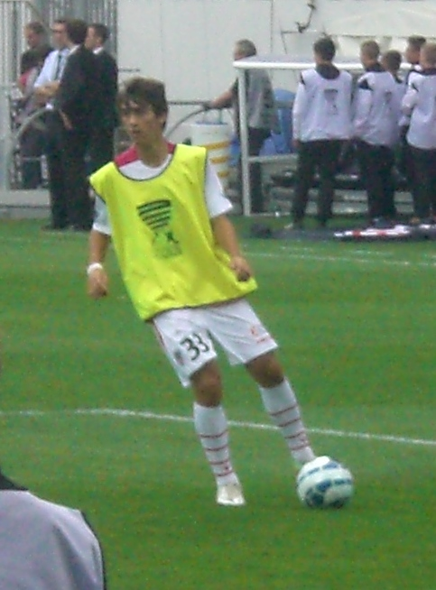 Vincent Marchetti (#33) avant le match Lens / AC Ajaccio, le 11 août 2015, au Stade Bollaert-Delelis, comptant pour le premier tour de la Coupe de la Ligue française de football.